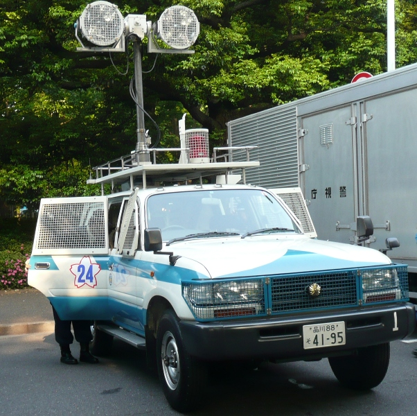 投光車。警視庁機動隊観閲式にて撮影。